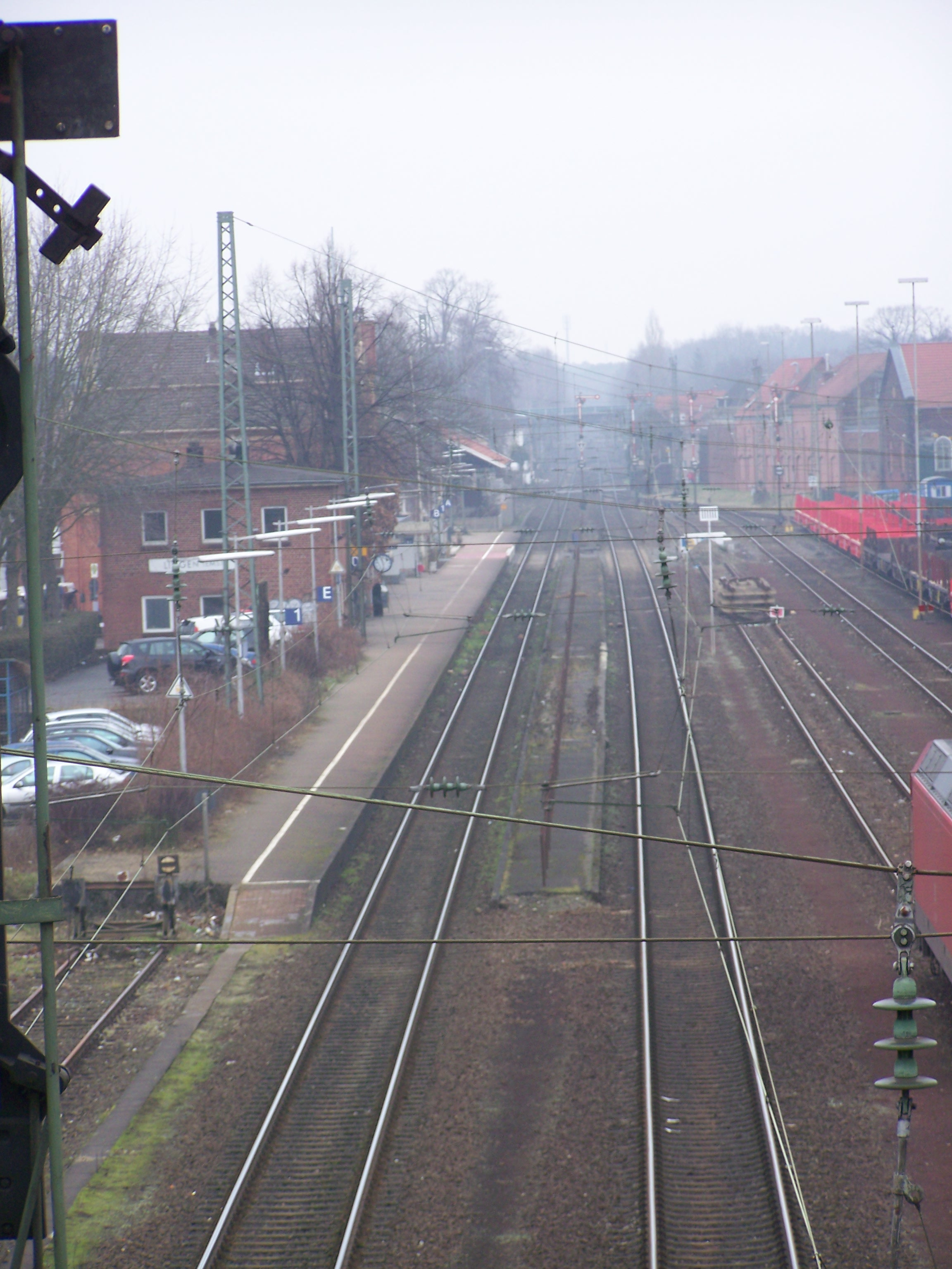 Blick von Fußgängerbrücke auf Bahnhof Lingen